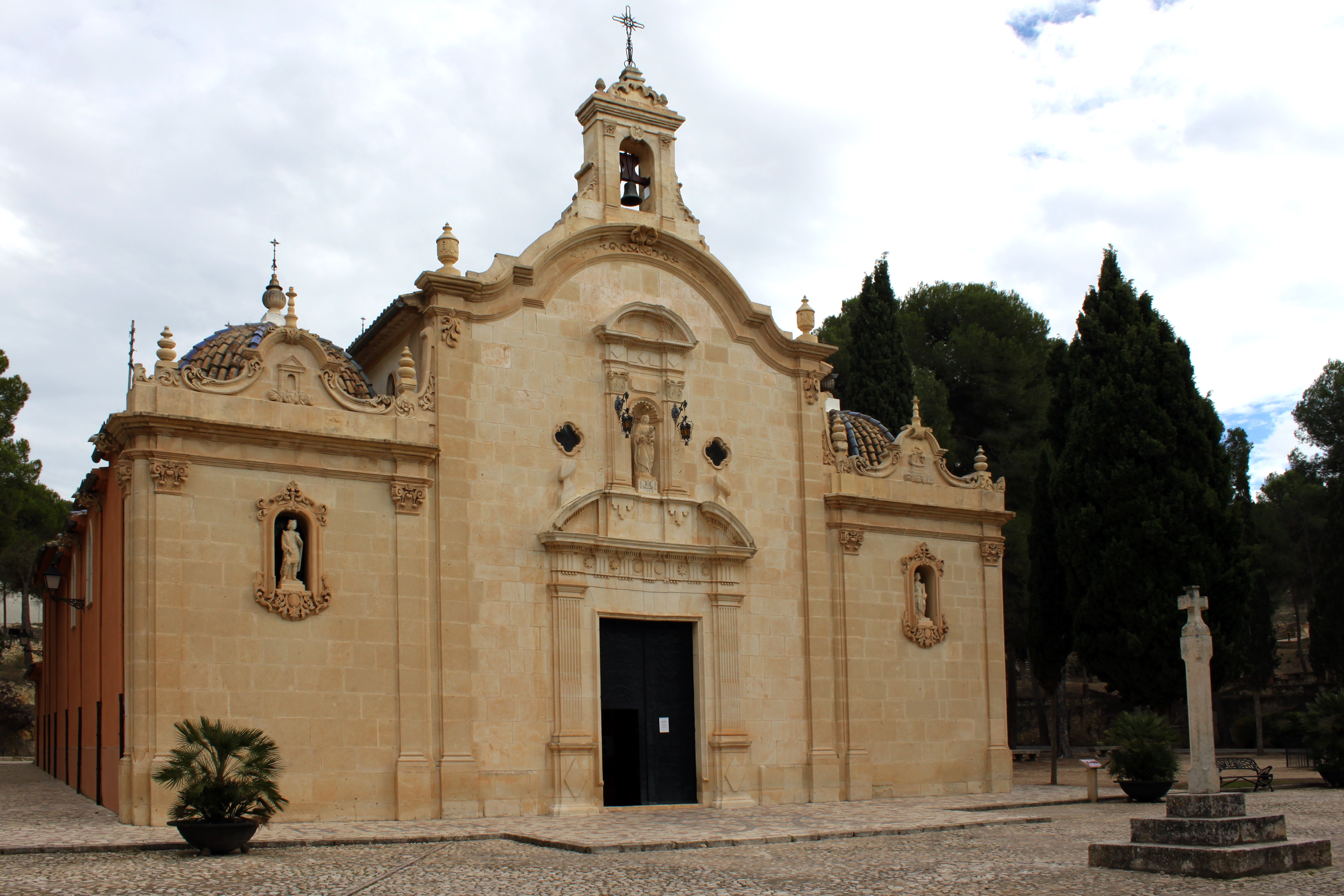 Vista exterior del Santuario de la Virgen de Gracia de Biar, provincia de Alicante, España.